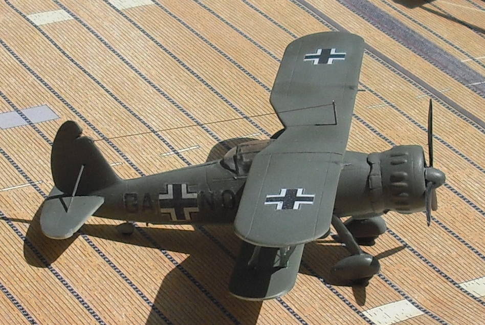 Modellbild einer Ar 197